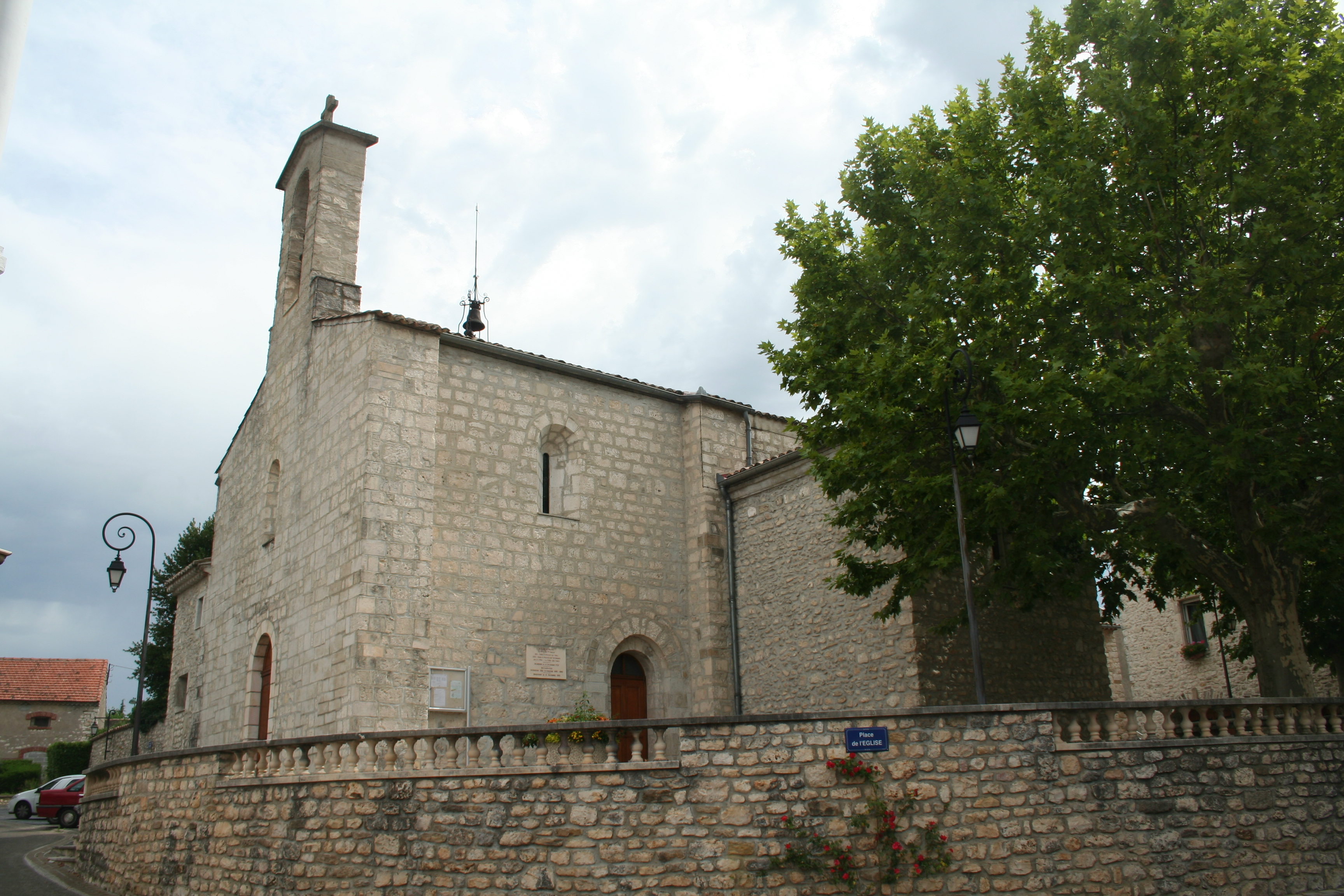 Saint-Privat-des-Vieux (Gard) - vue générale de l'église